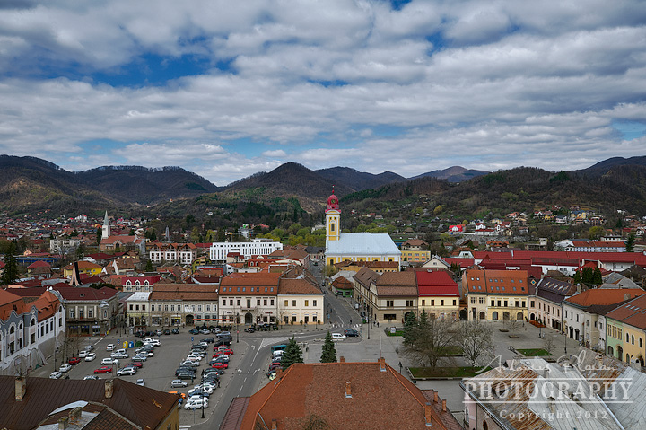 Centrul istoric al municipiului Baia Mare (Orașul medieval Rivulus Dominarum)